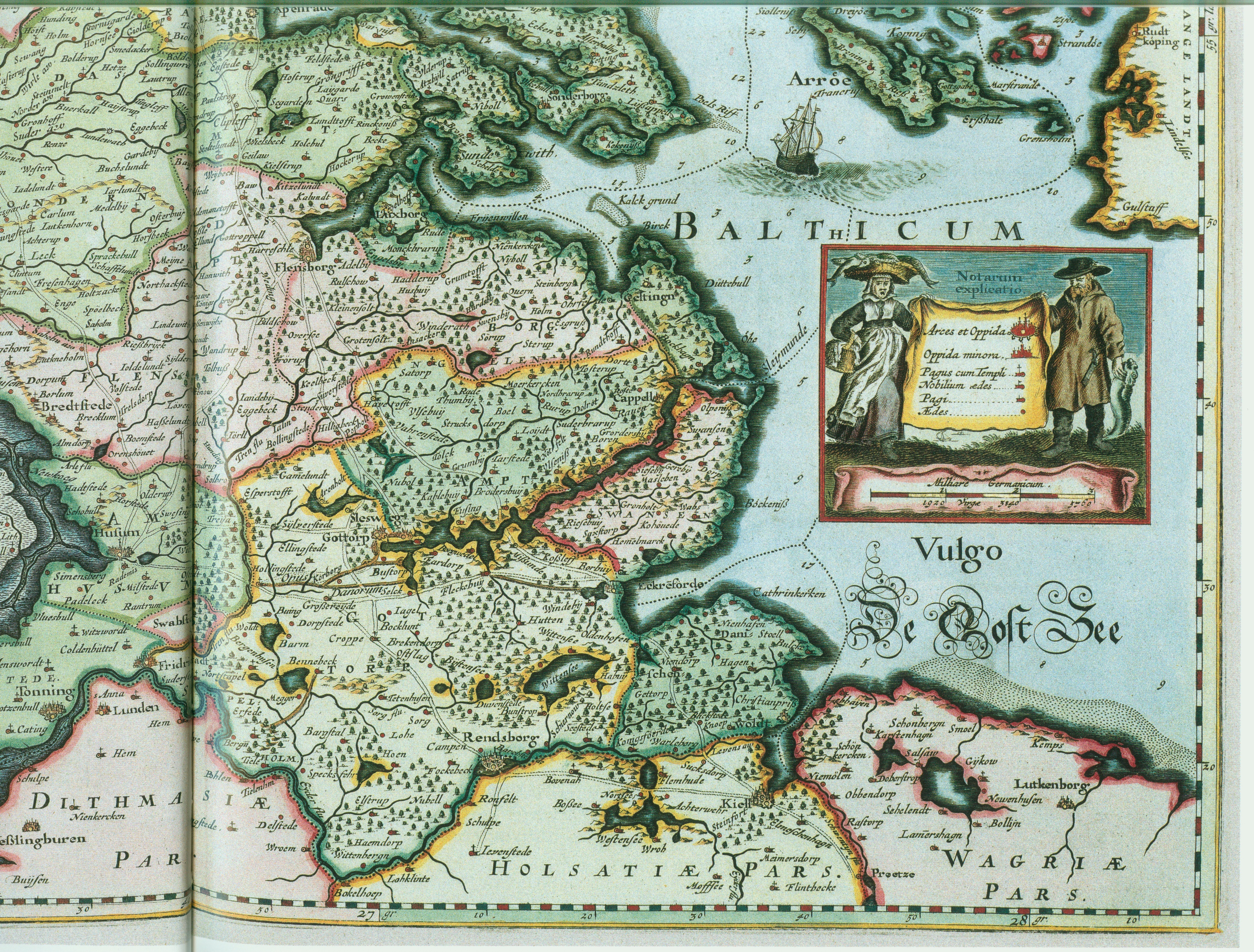 Herzogtümer Schleswig oder Südjütlandg gestochen von den Gebrüdern Matthias und Nicolaus Peters Goldschmiede aus dem Zimbrischen Husum (Teil unten-rechts)